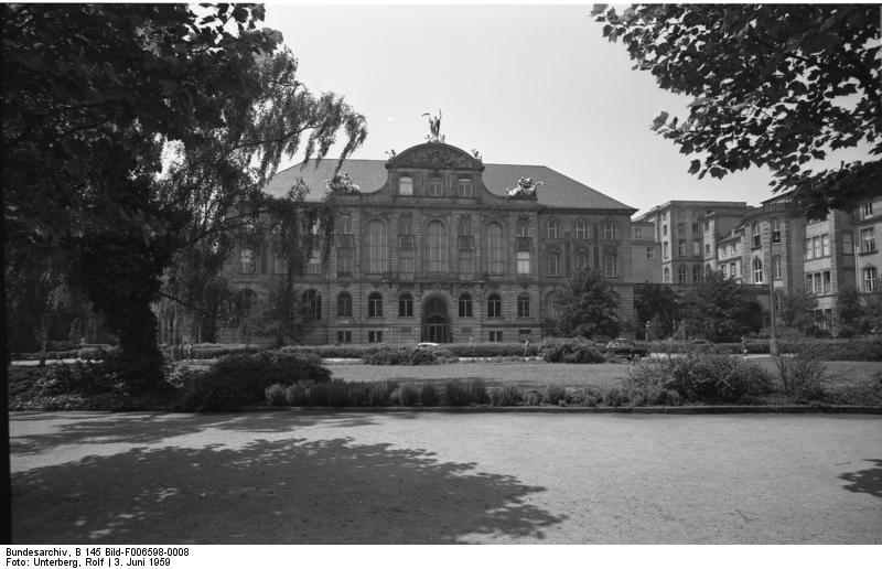 Stadtbilder Frankfurt/Main Senckenberg-Institut